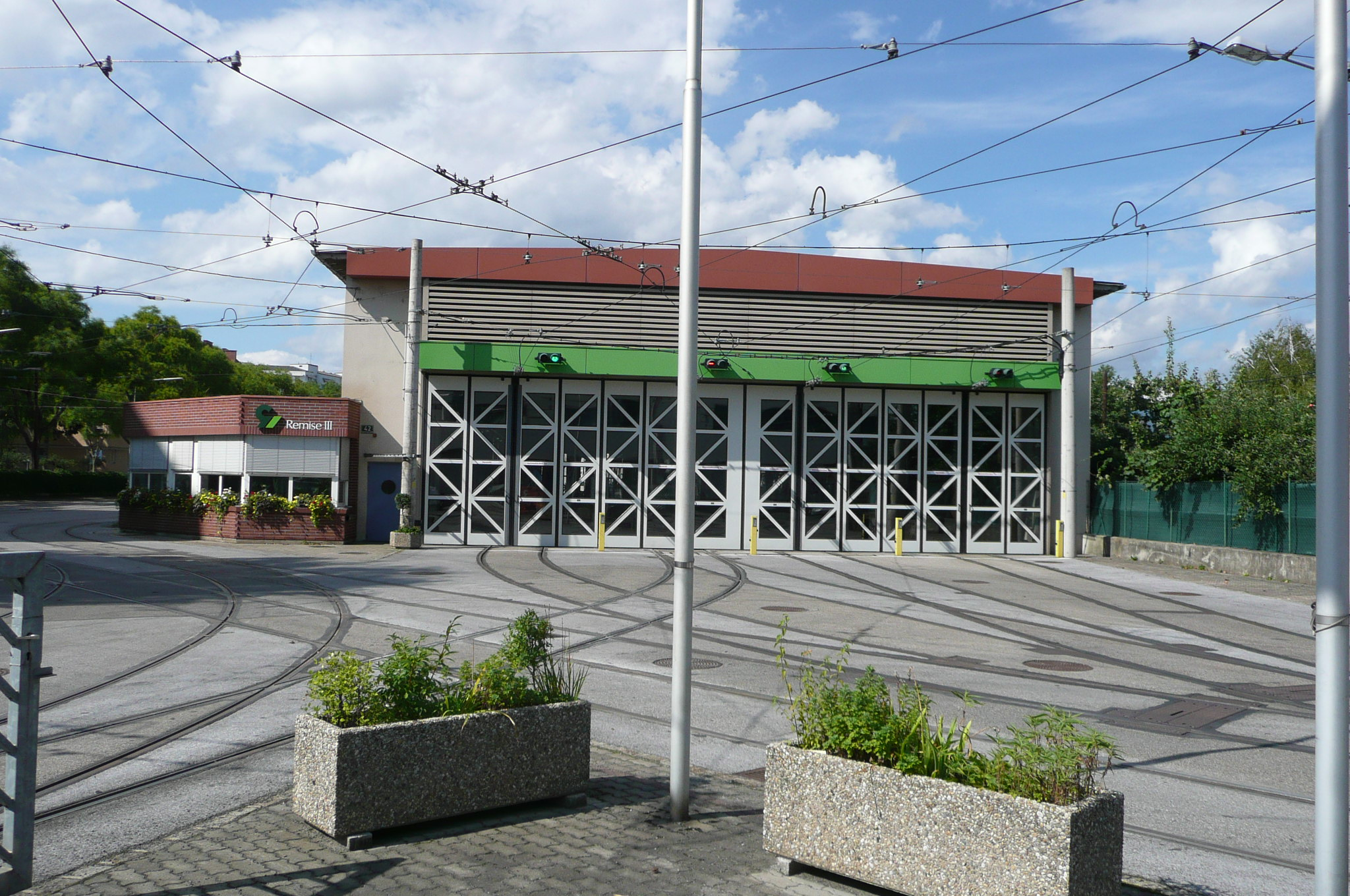 Remise III der GVB, Graz-Eggenberg